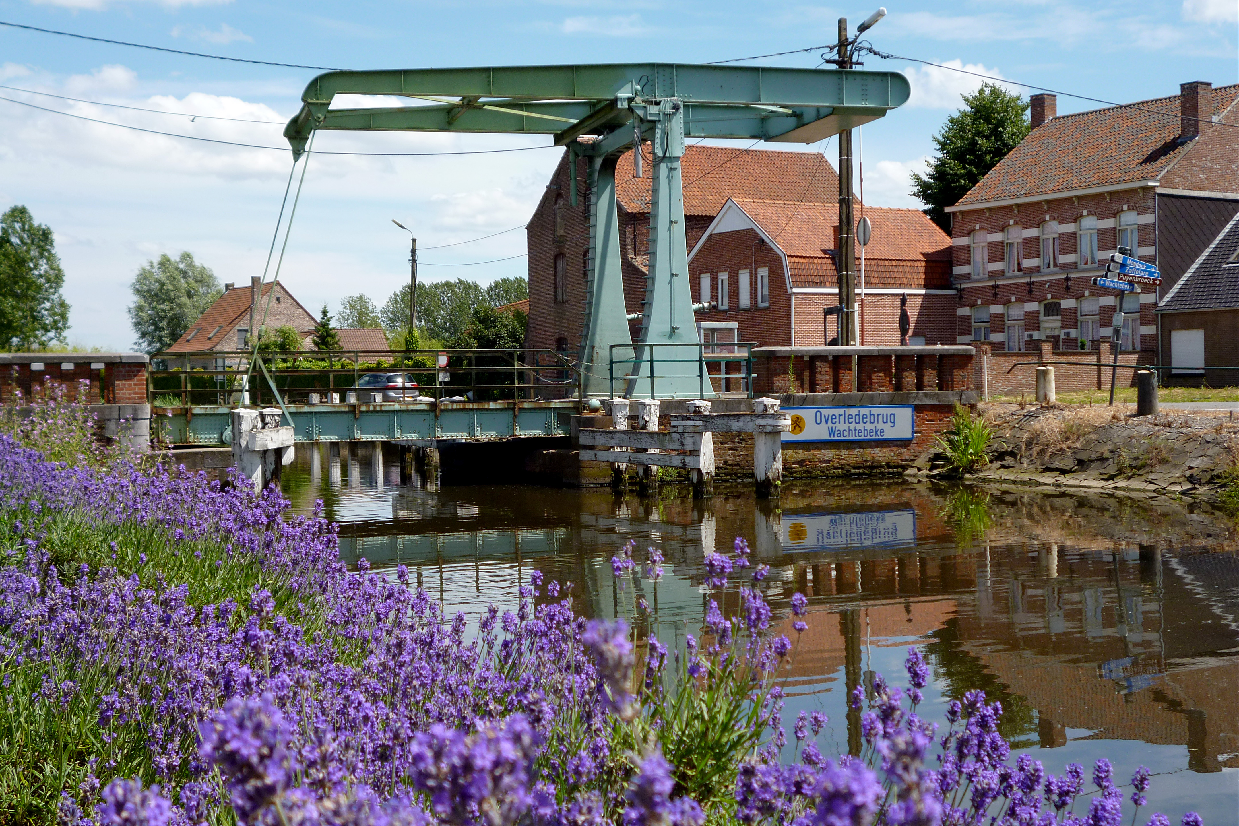 Overledebrug over de Moervaart in Wachtebeke, Meersstraat